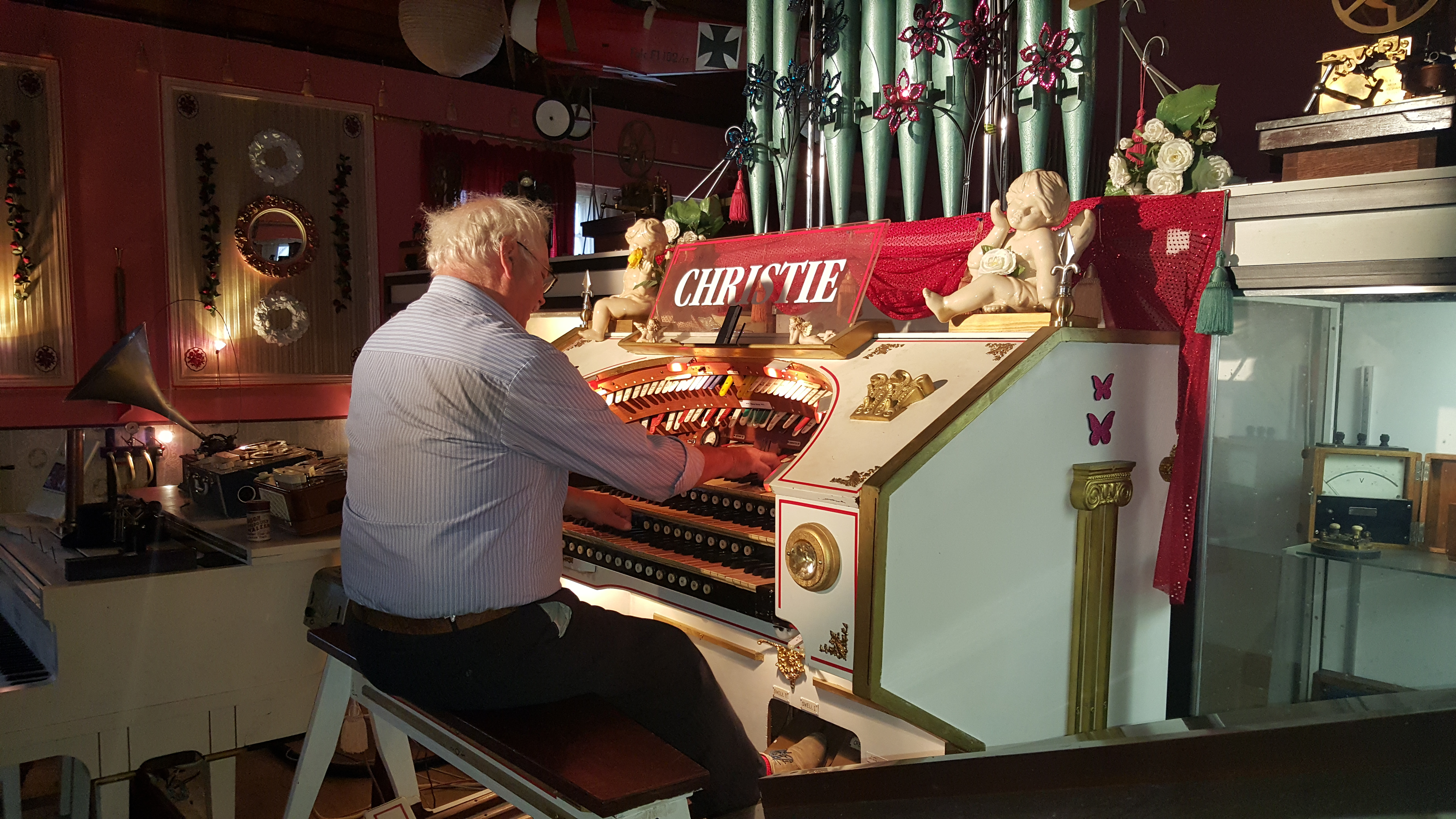 Et ”Christie” 3 manuals 8 rank pibeorgel med tilsluttet medspillende flygel, som oprindeligt blev opstillet i en biograf i London i 1927, kan ses og høres i Hornstrup Mølleby på Møllebyvej 16 (6 km fra Vejle centrum) og er her hovedattraktionen i samlingen af antik- og gammel teknik/mekanik. Orglet trækkes af en 7,5 HK el-motor, vejer samlet vel 5 tons og installationen varede 8 måneder. Effekterne til stumfilm er stadig virkende. Et unikt musikinstrument!